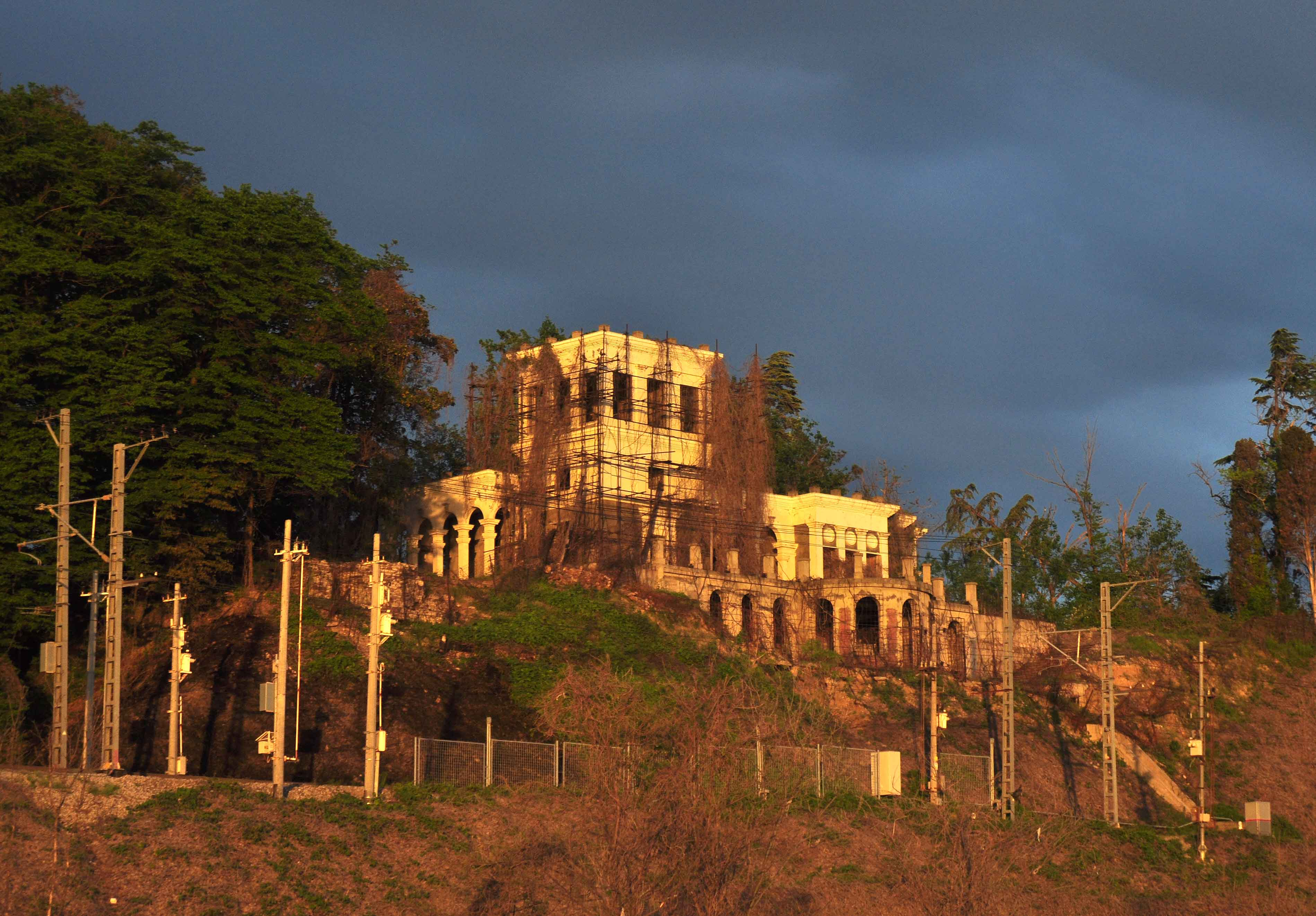 Здание санатория "Горьковского Обкома партии"